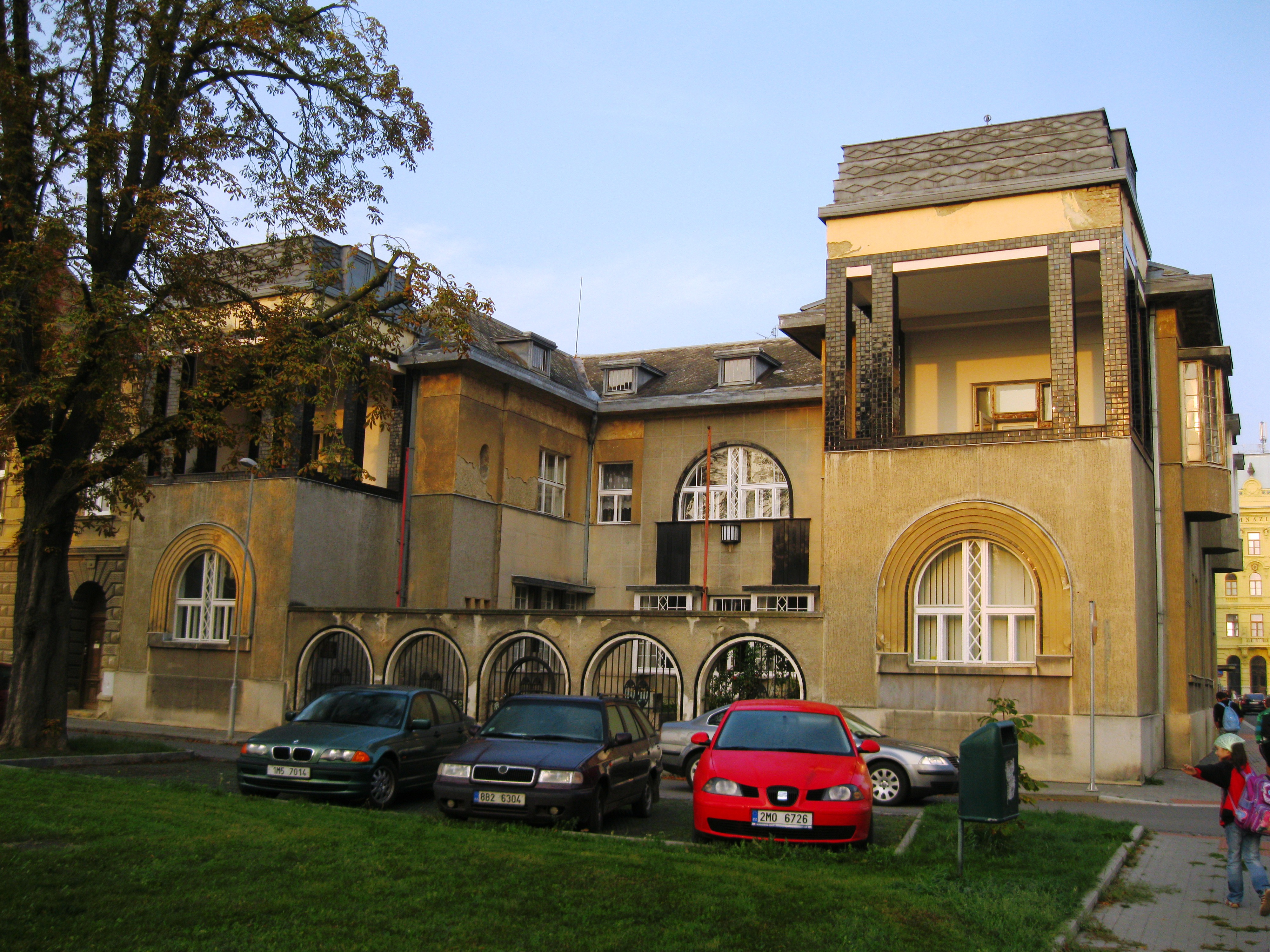 Rodinný dům dr. Františka Kovaříka (Prostějov), Erbenova, nám. Padlých hrdinů 2589/1, Prostějov